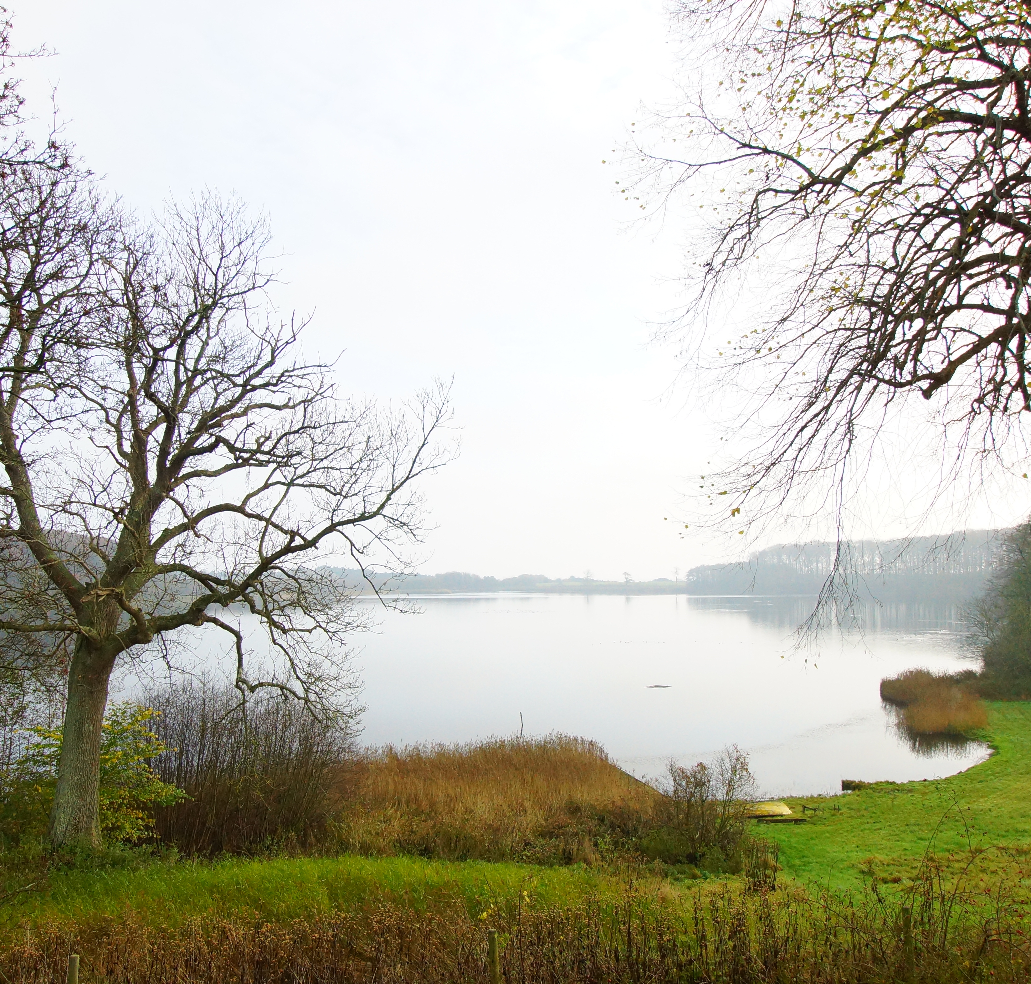 Rugård Slot, udsigt mod øst, Nørresø